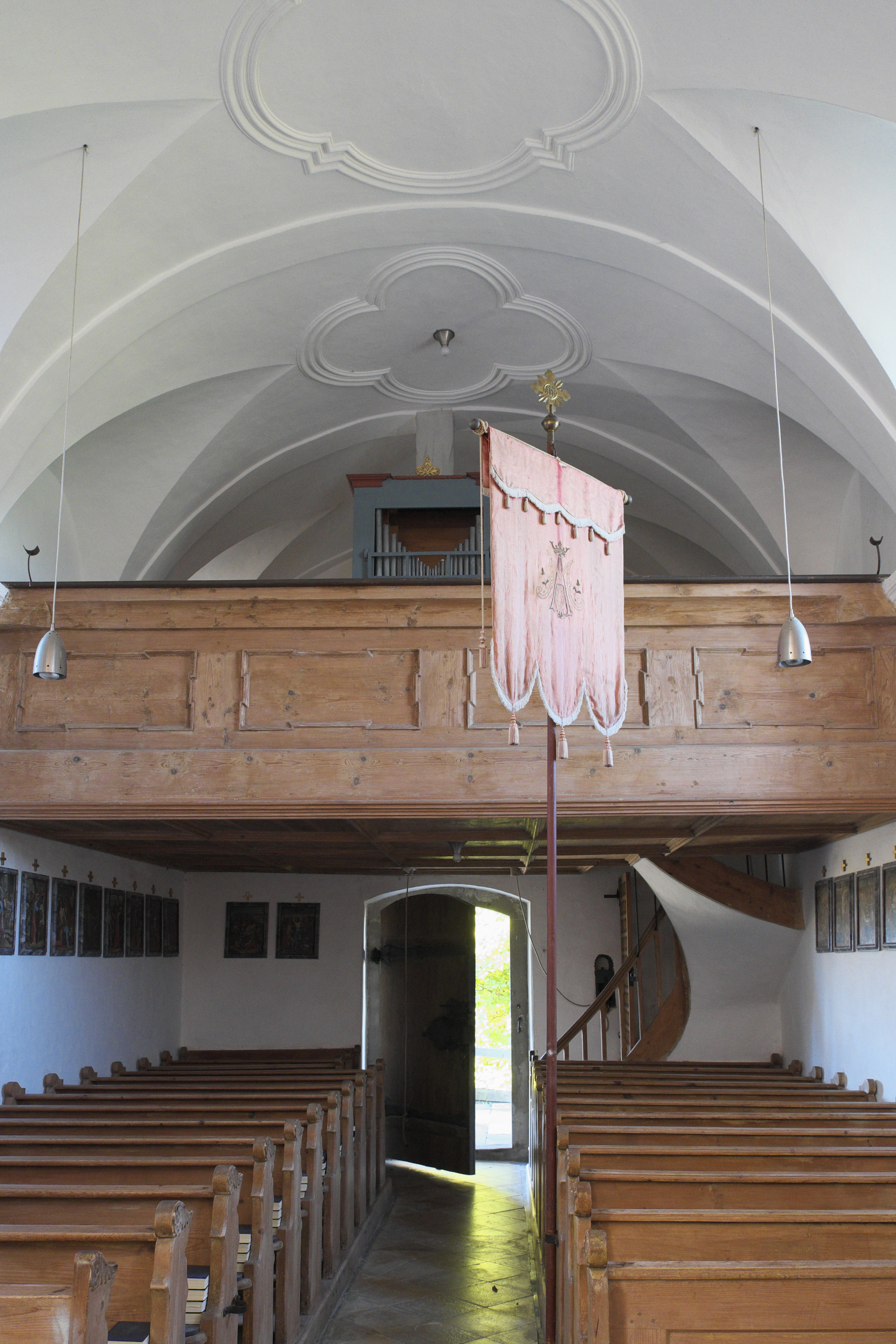 Katholische Filialkirche St. Johannes der Täufer in Sankt Johann (Siegsdorf) im Landkreis Traunstein (Bayern/Deutschland), Empore